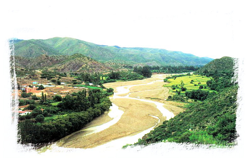 Vitichi